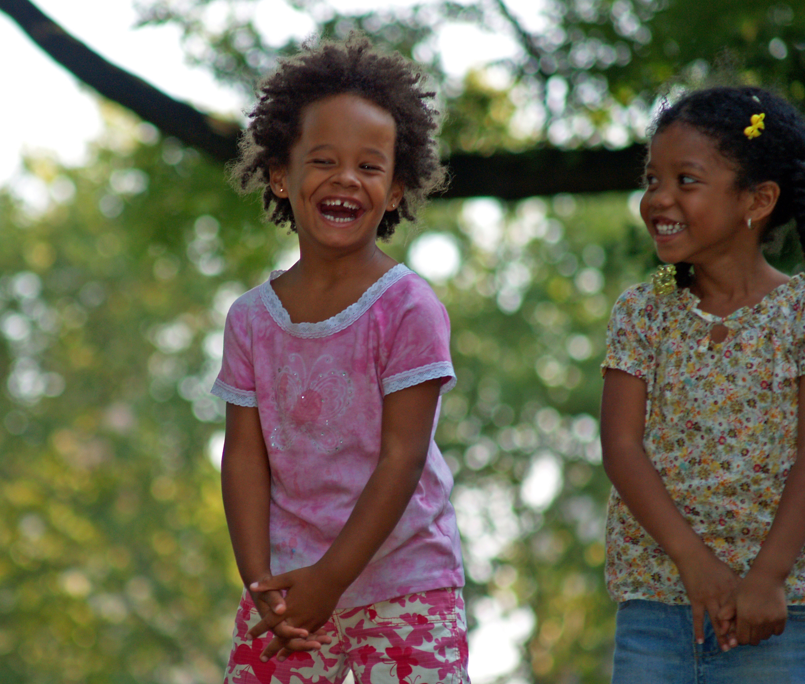 Laughter